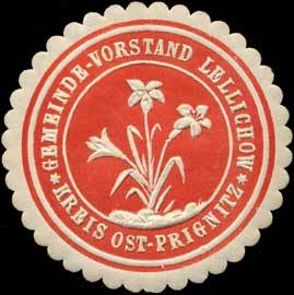 Sealing stamp Title: Gemeinde-Vorstand Lellichow - Kreis Ost-Prignitz Description: rot, weiß, geprägt Place: Lellichow size: 4 cm